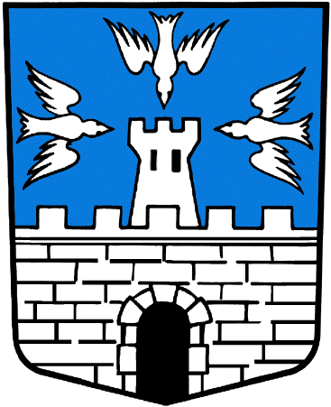 Wappen von Collomey-Muraz Kanton Wallis SCHWEIZ